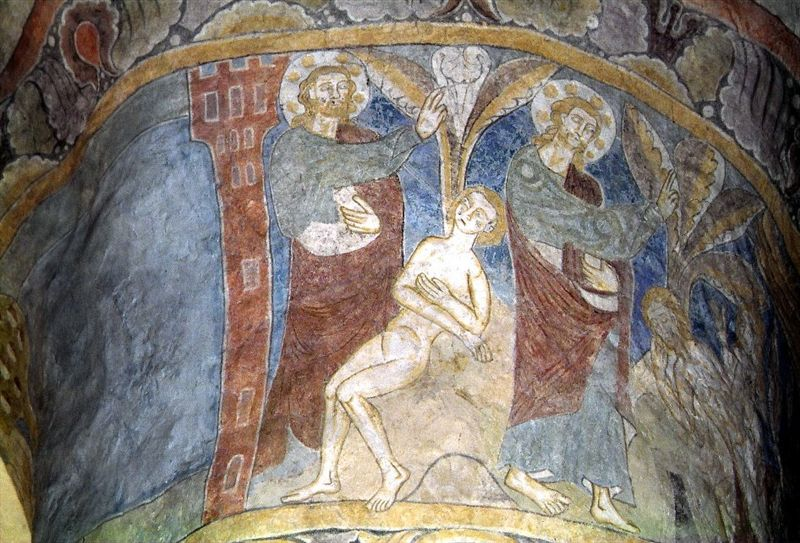 Nylars Kirke på Bornholm